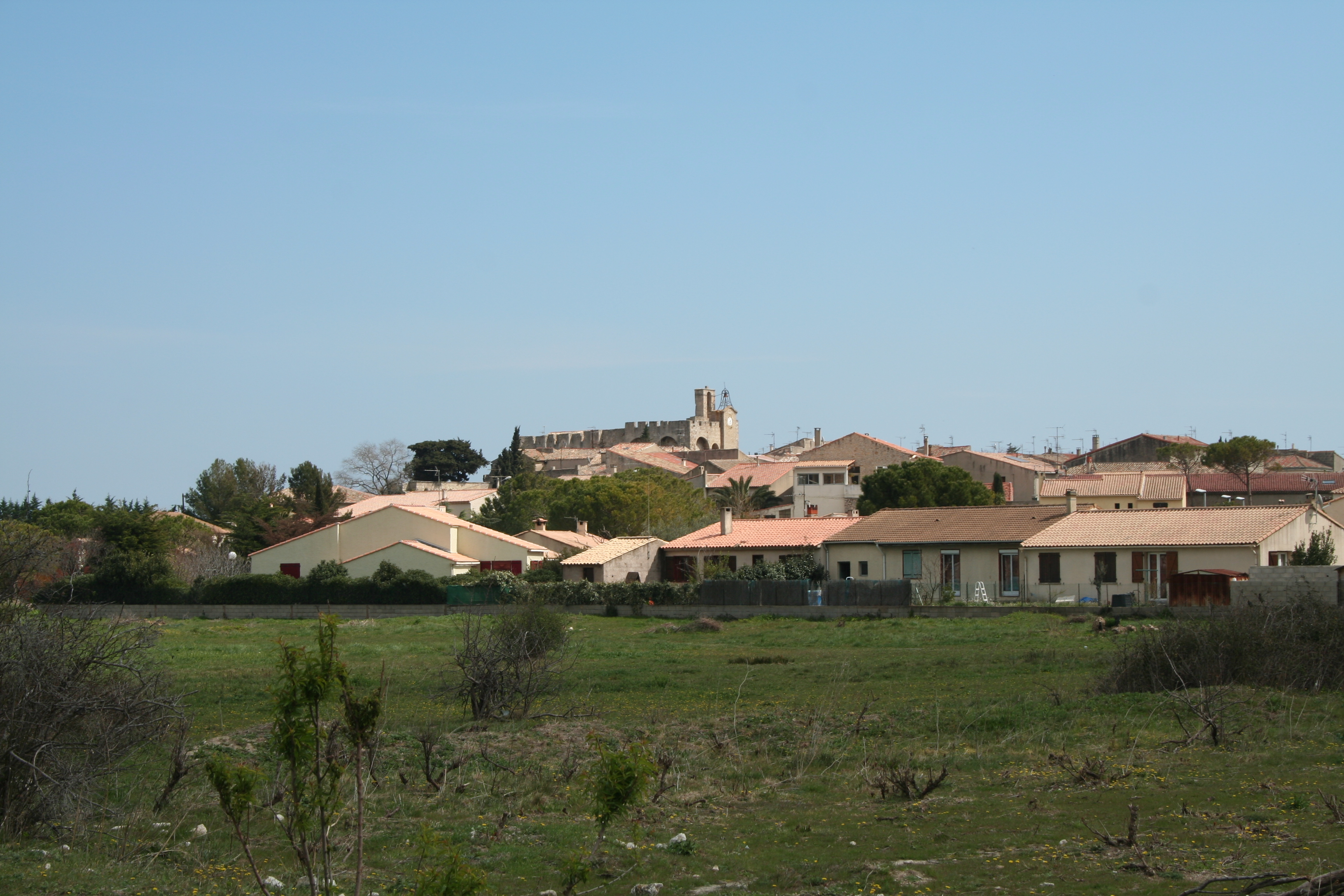 Vic-la-Gardiole (Hérault) - vue générale.